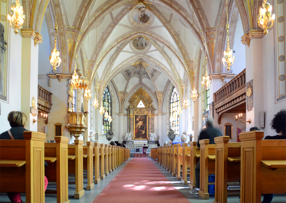 Klarakirche Stockholm, Inneres